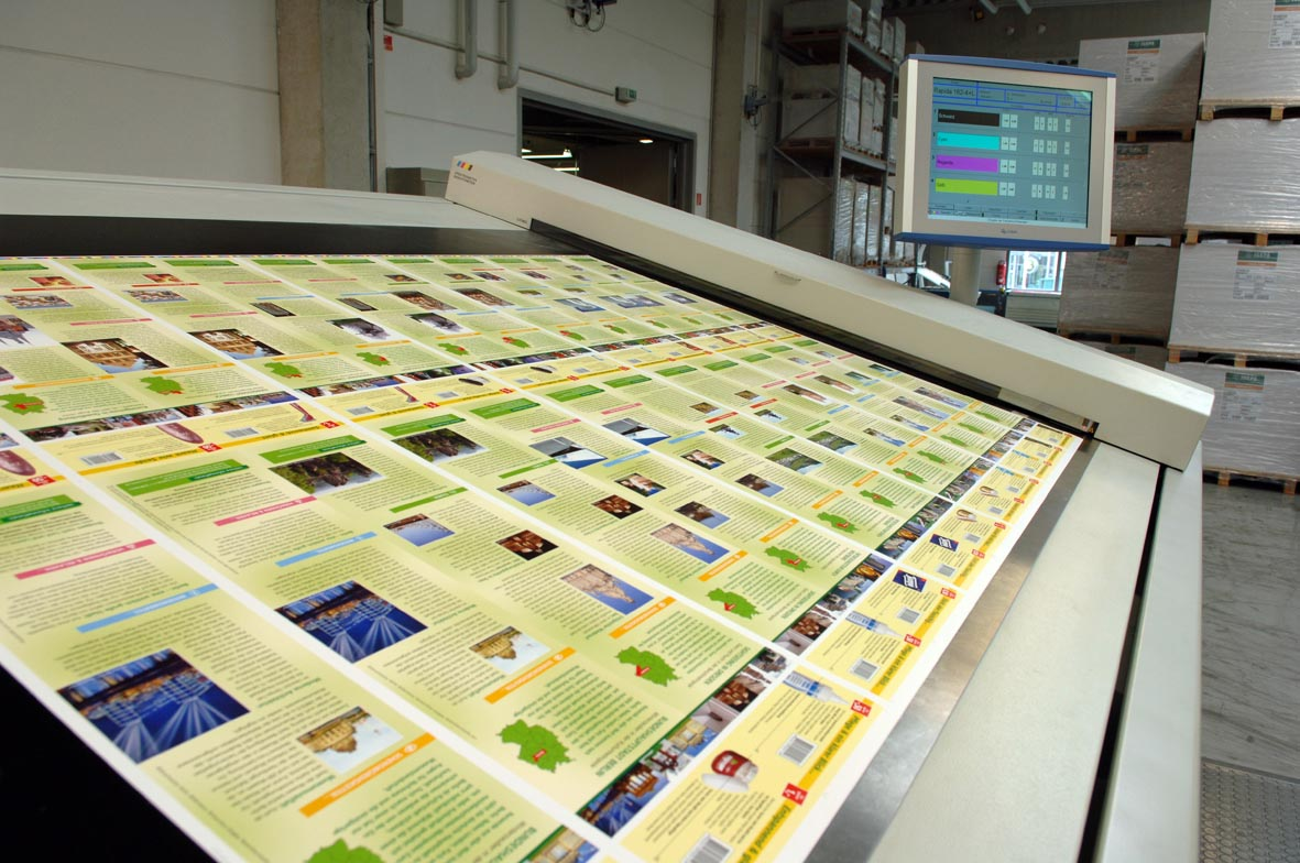 Elektromotorische Hybridlösung eines deutschen Druckmaschinenherstellers, die einen farbmetrischen und einen klassisch-densitometrischen Messkopf besitzt. Demzufolge kann das System in beiden Messmodi gleichzeitig in einer einzigen Scanbewegung messen; der Einsatz physikalischer Filter im Densitometerkopf erlaubt jedoch kein exaktes Ermitteln von Sonderfarbdichten. Die Bewegung in X-Richtung kann durch eine Bewegung in Y-Richtung überlagert werden, wodurch sich beliebige, zuvor programmierte Messstellen auf dem Druckbogen ansteuern lassen – zwecks Messung im Bild.